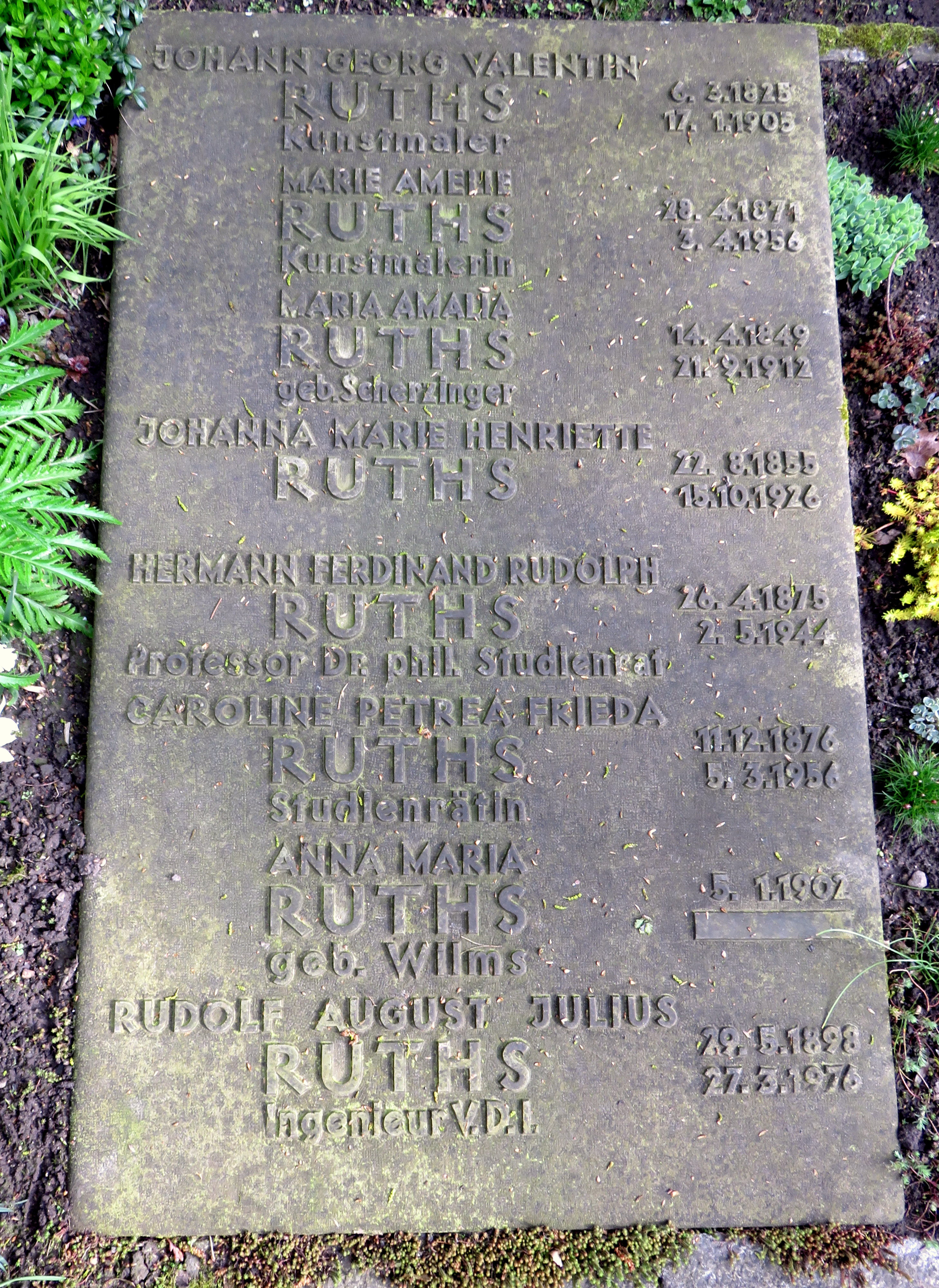 Historischer Grabstein der Kunstmalerin Marie Amelie Ruths im Bereich des Gartens der Frauen auf dem Ohlsdorfer Friedhof in Hamburg-Ohlsdorf.